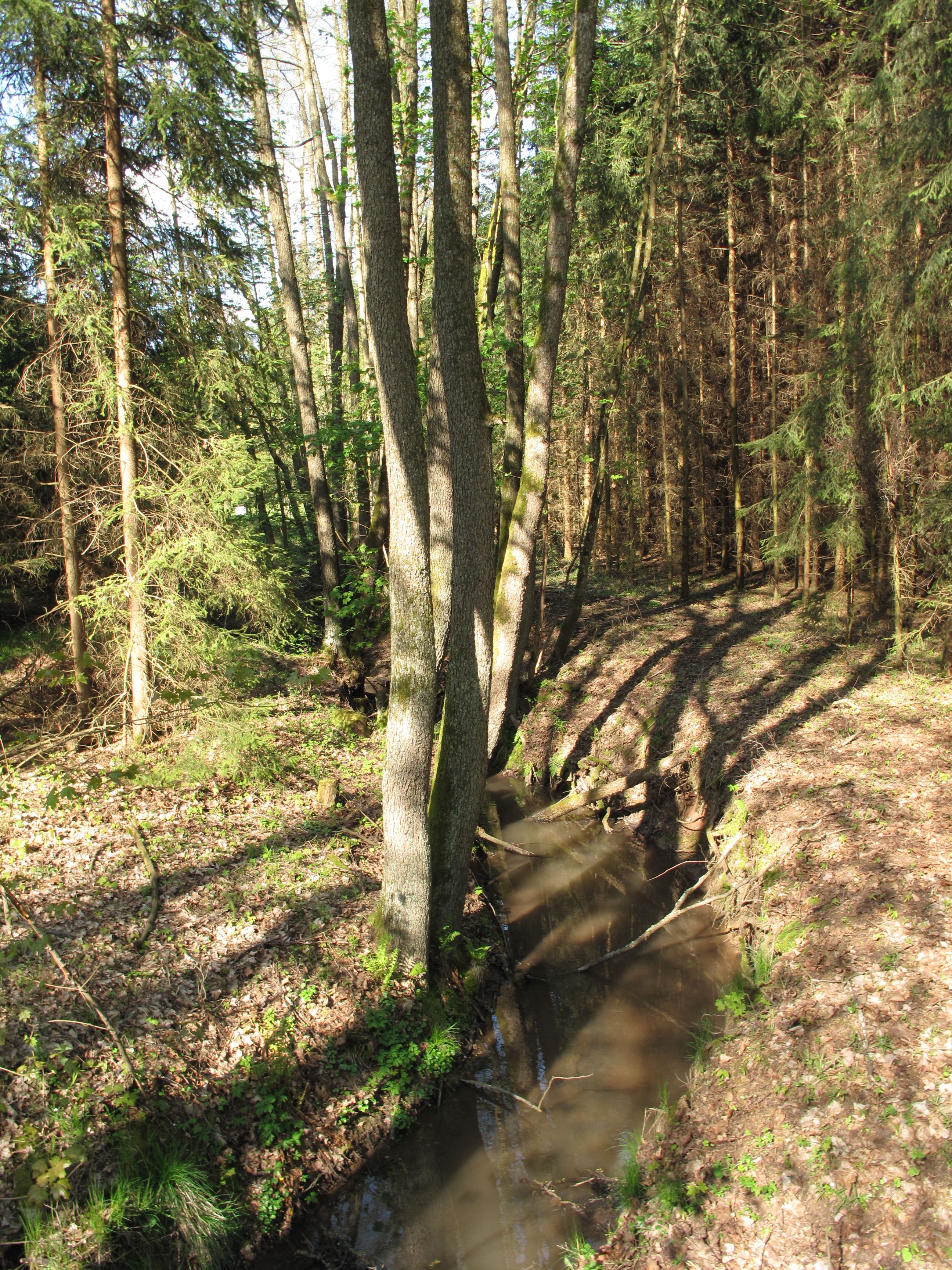 Bohumilský potok. Okres Praha-východ, Česká republika.